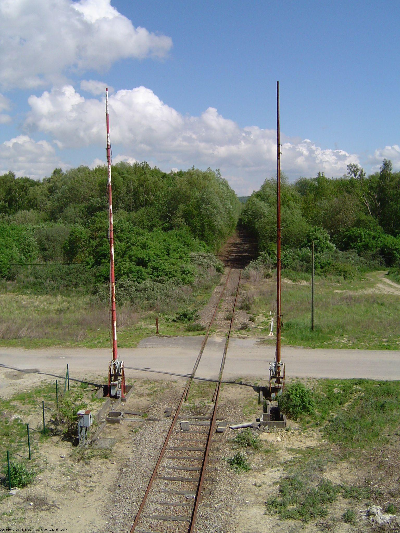 Passage à niveau à barrière non automatique sur une ligne ferroviaire proche de Honfleur dans le Calvados en France.